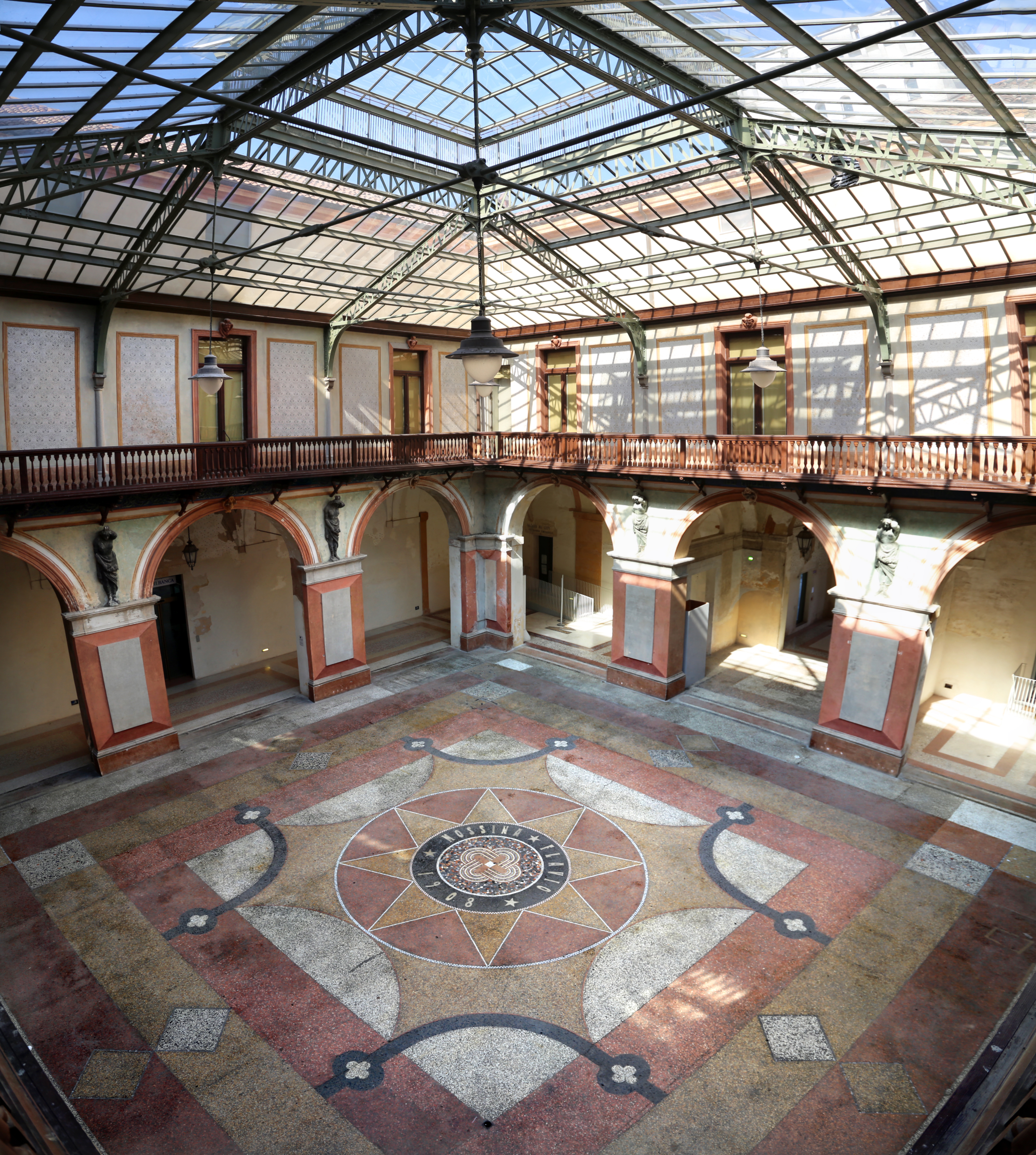 Palazzo Ducale (Guastalla) This is a photo of a monument which is part of cultural heritage of Italy.